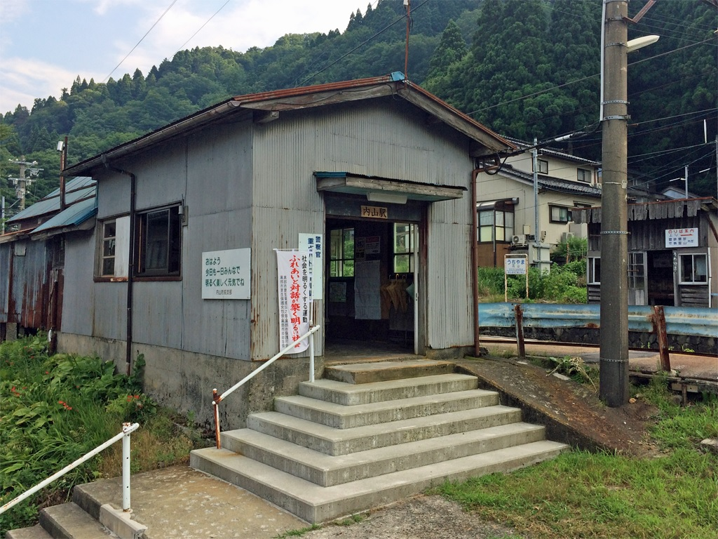 富山地方鉄道本線 内山駅 駅舎